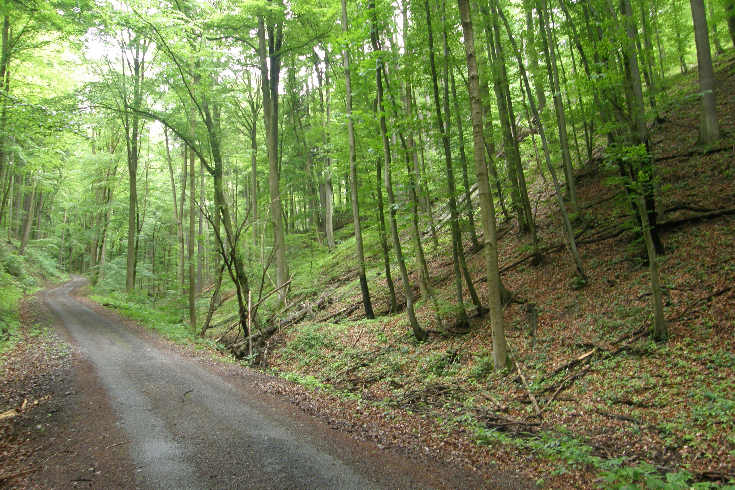 Jihozápadní okraj přírodní rezervace Coufavá; vlevo asfaltová stejnojmenná cesta z Adamova na Vranov